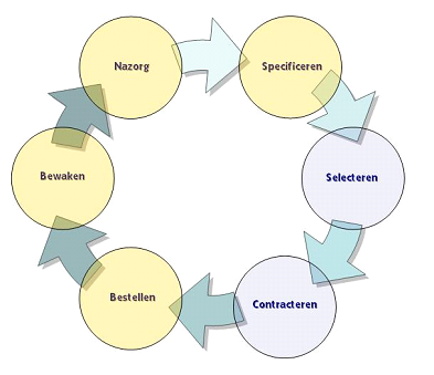 Model ontwikkeld door Dhr. A. van Weele wat de 6 stappen van het inkoopproces weergeeft.